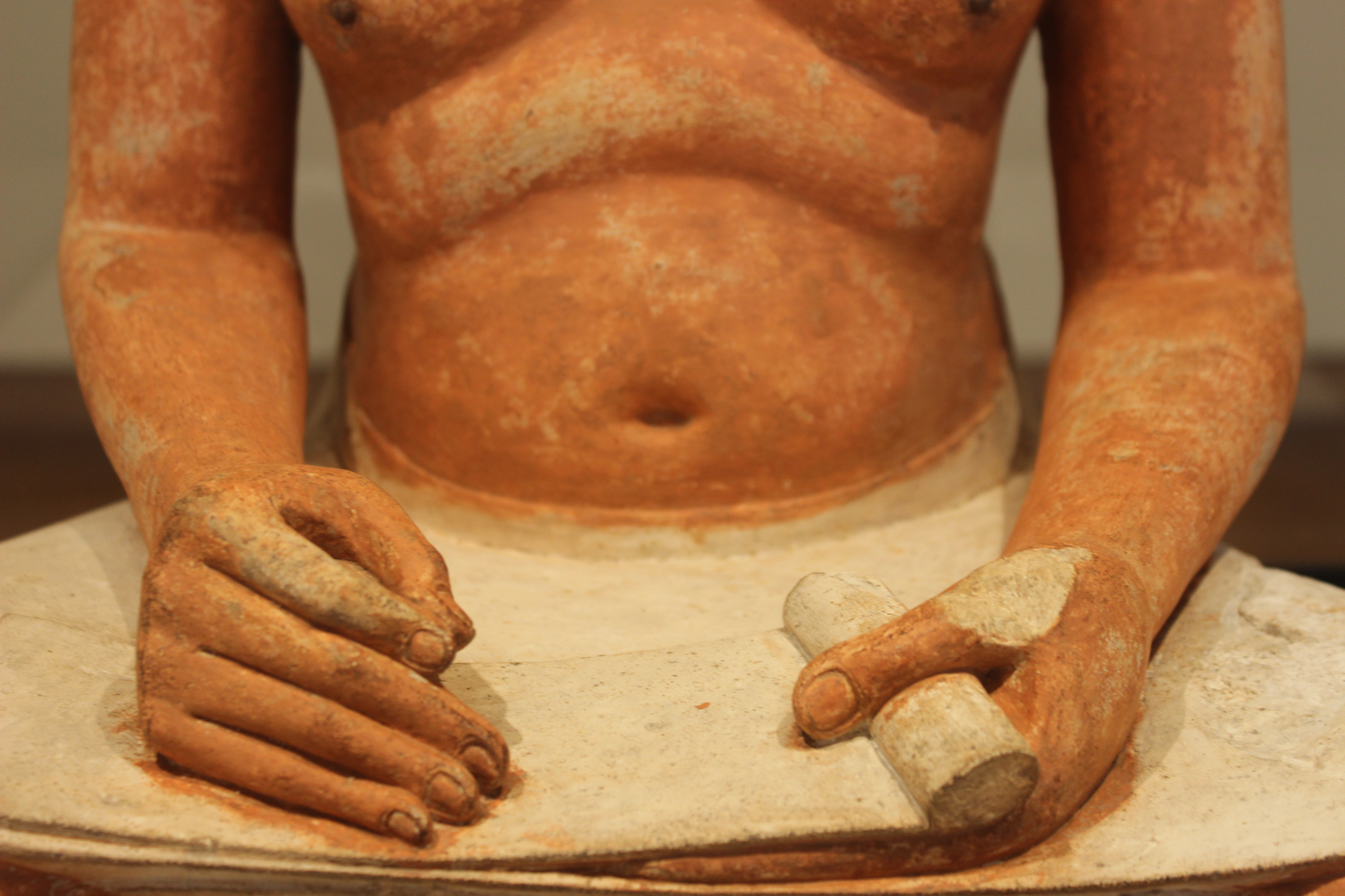 Museo del Louvre. Escriba sentado.